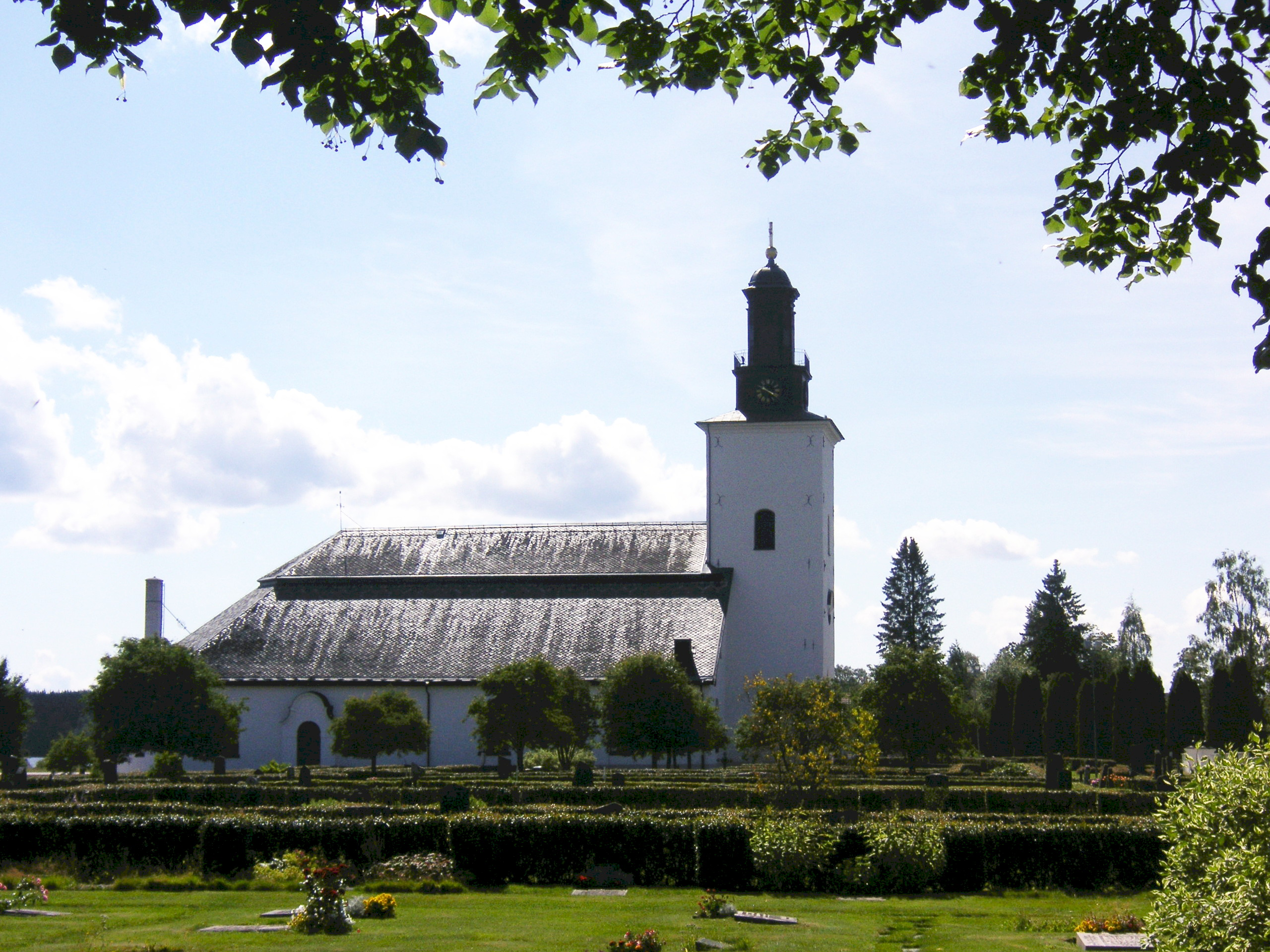 Grangärde kyrka sommaren 2007